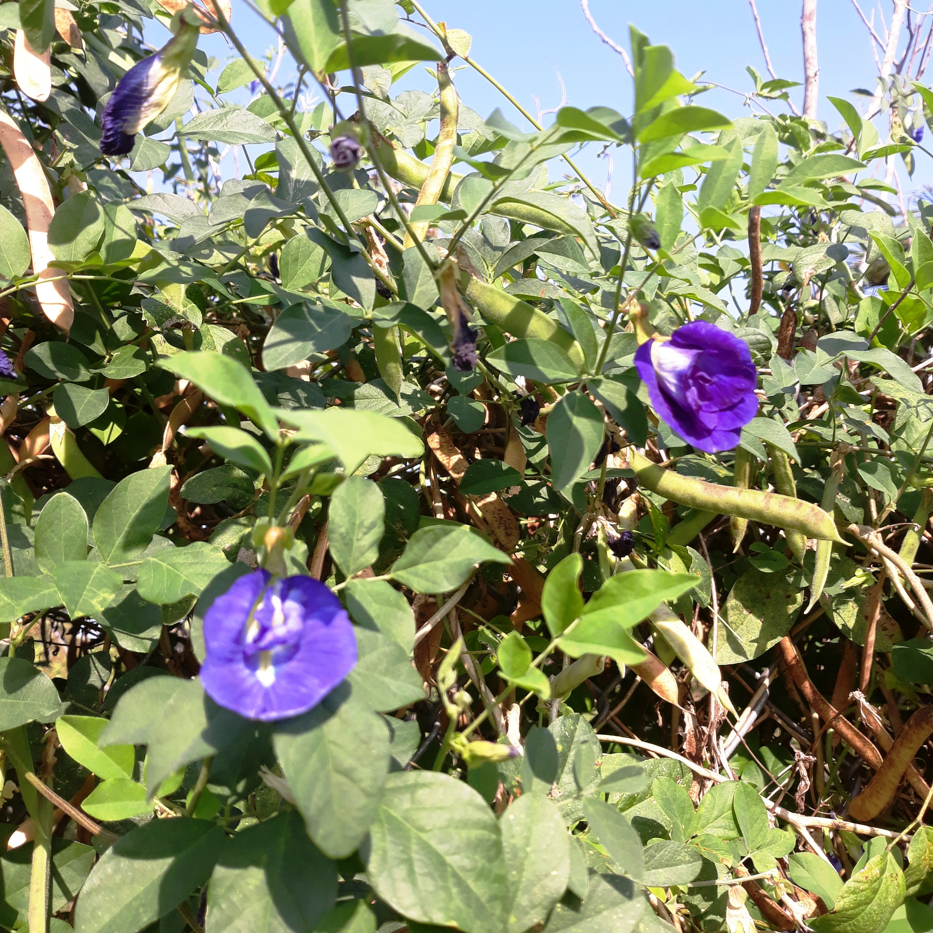 đậu biếc